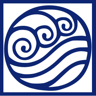 Emblema de las tribus agua de Avatar